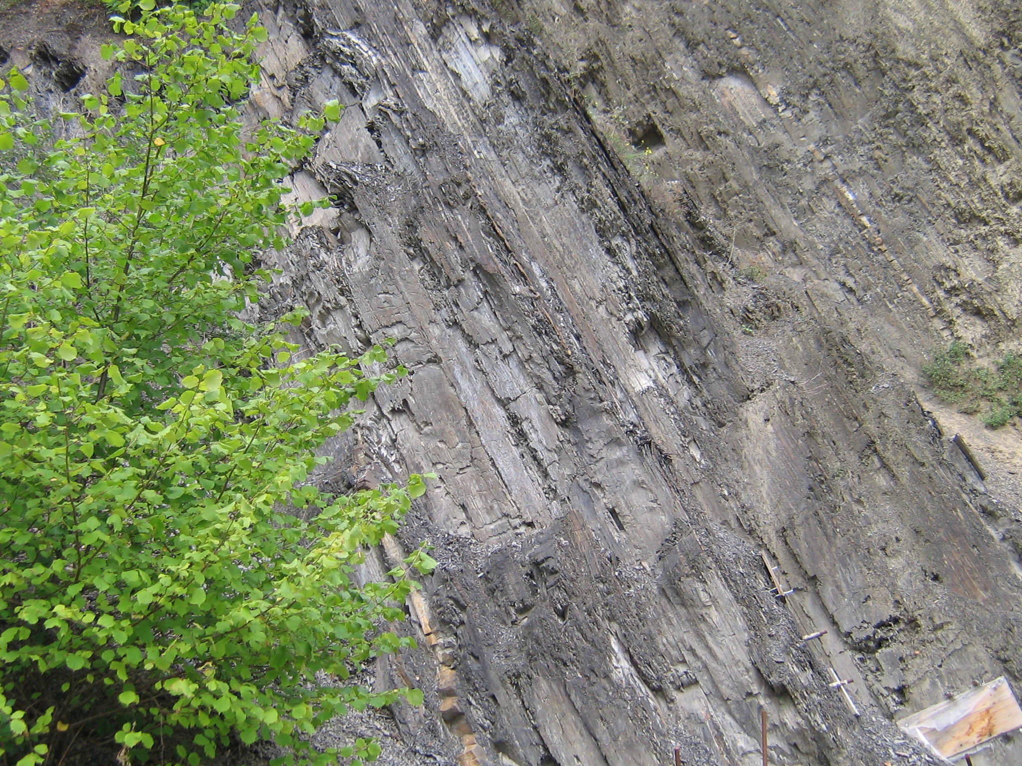 Schluffschichtung in Schräglage der Zeche Klosterbusch